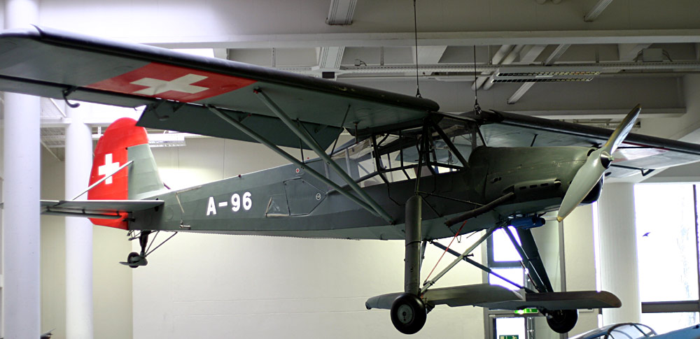 Fieseler Storch; Es handelt sich bei diesem Flugzeug um eine C-1 mit der Wnr.4299, die am 5.10.1939 vom Werkspiloten Biedermann in Kassel eingeflogen und wenige Tage später an die Ostschweizerische Aero-Gesellschaft in St.Gallen abgeliefert wurde. Mit dem Kennzeichen HB-ARU wurde es zugelassen. Von 1940 bis 1945 als A-96 für den Militärdienst requiriert, wurde es nach Kriegsende der ursprünglichen Besitzerin zurückgegeben. 1960 vom Staat gekauft und bis 1963 betrieben, dann wegen Alterung stillgelegt und zwei Jahre später an das Deutsche Museum übergeben.